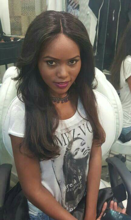 Atriz angolana